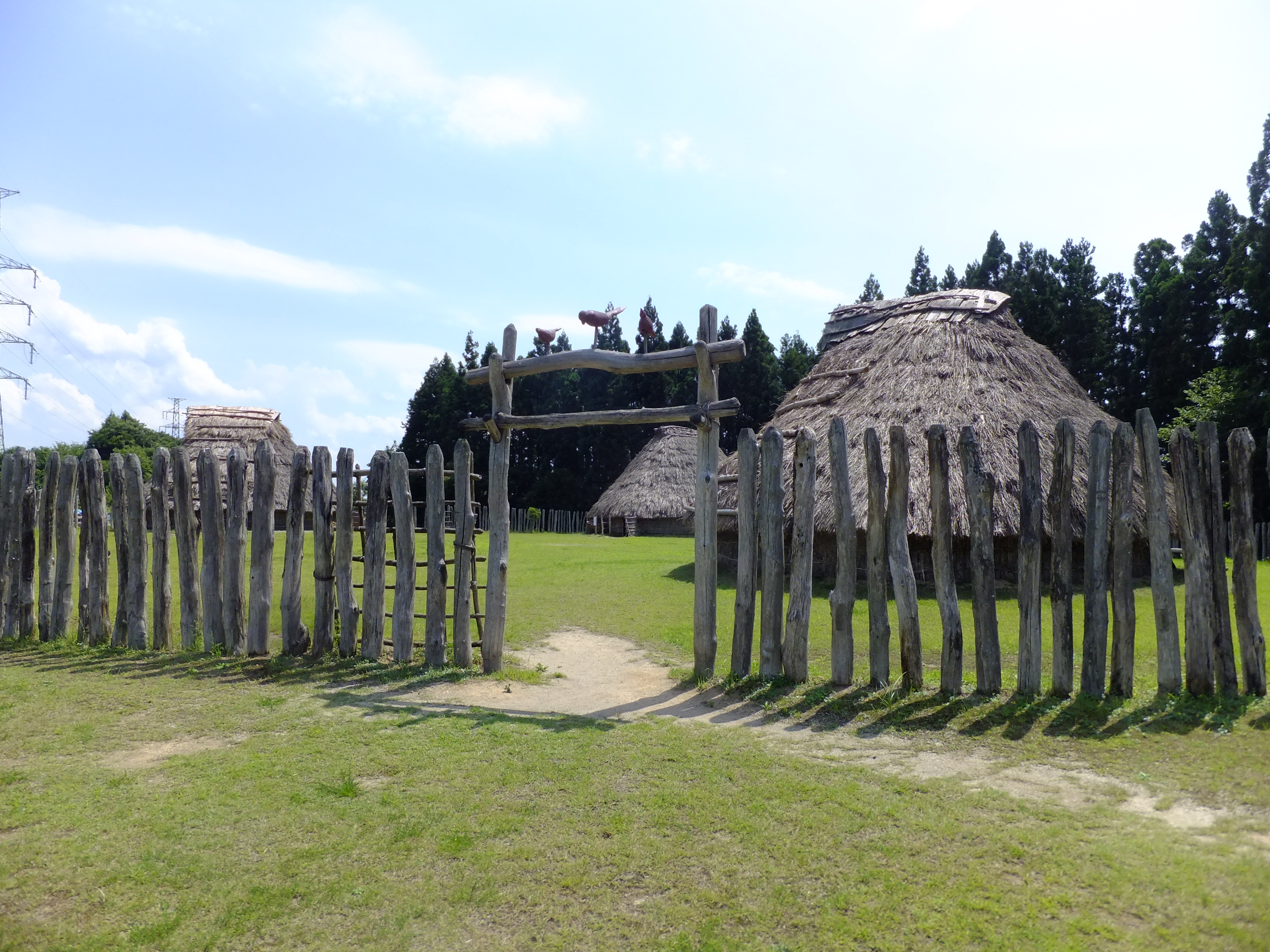 地蔵田遺跡（秋田県秋田市、御所野総合公園内）